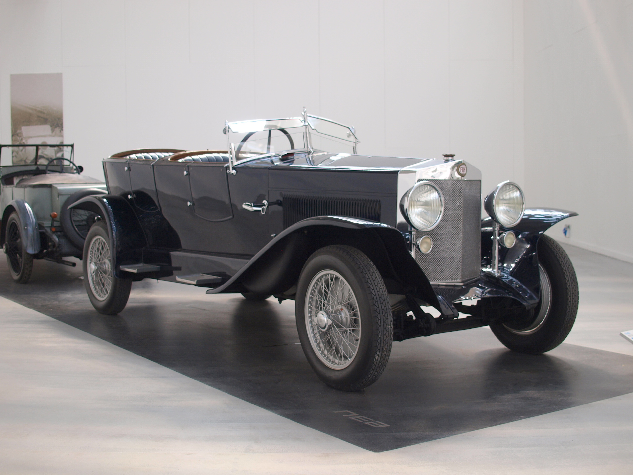 L'evolutione dell'automobile Fiat 519 S Torpedo